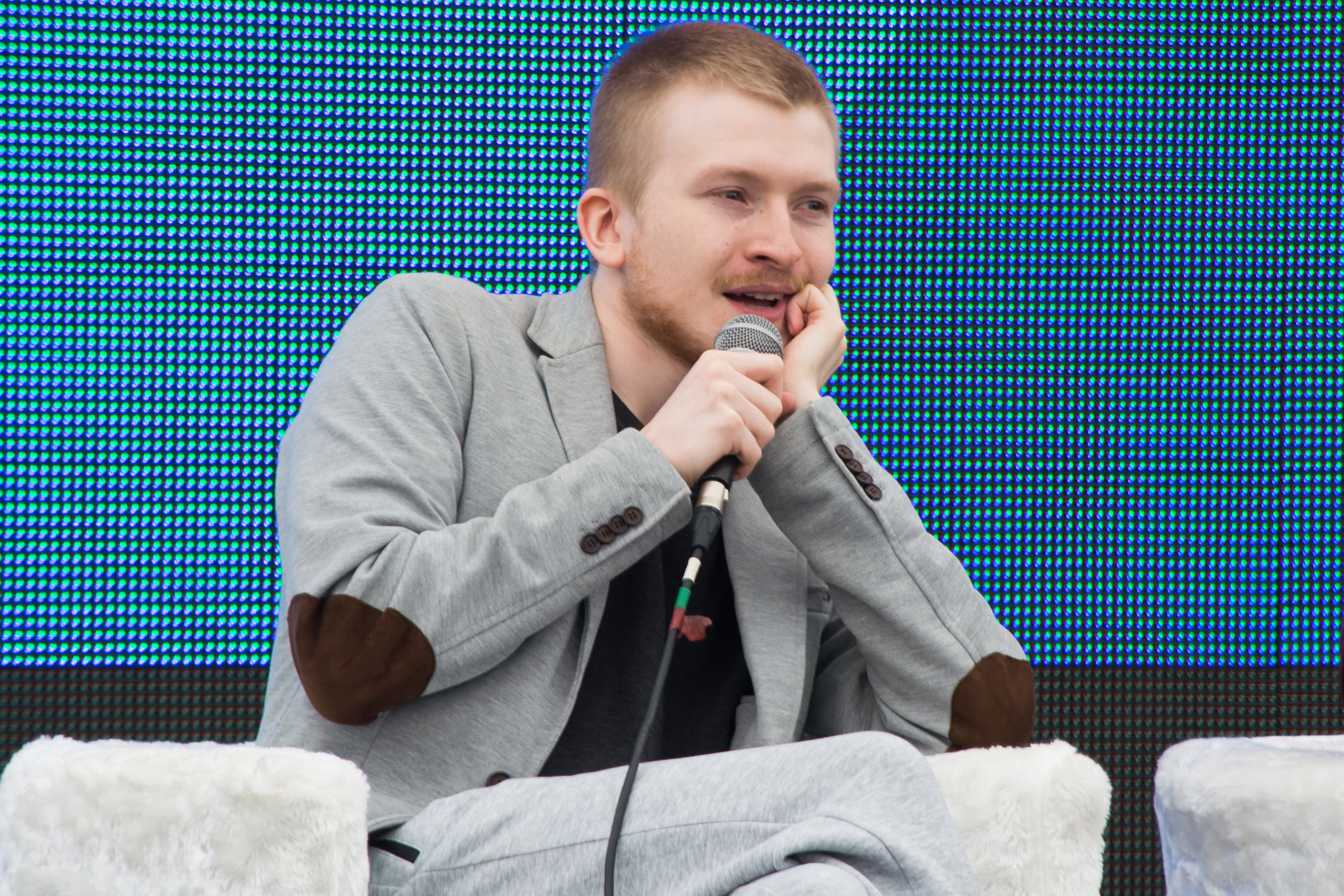 Данила Поперечный на Видфест 2016 в Санкт-Петербурге